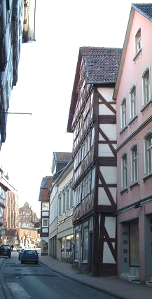 Homberg (Efze): Das Haus Stolzenbach vor der Sanierung 2005